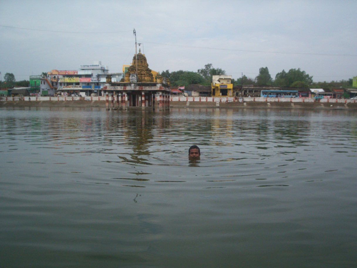 திருப்போரூர் குளம்